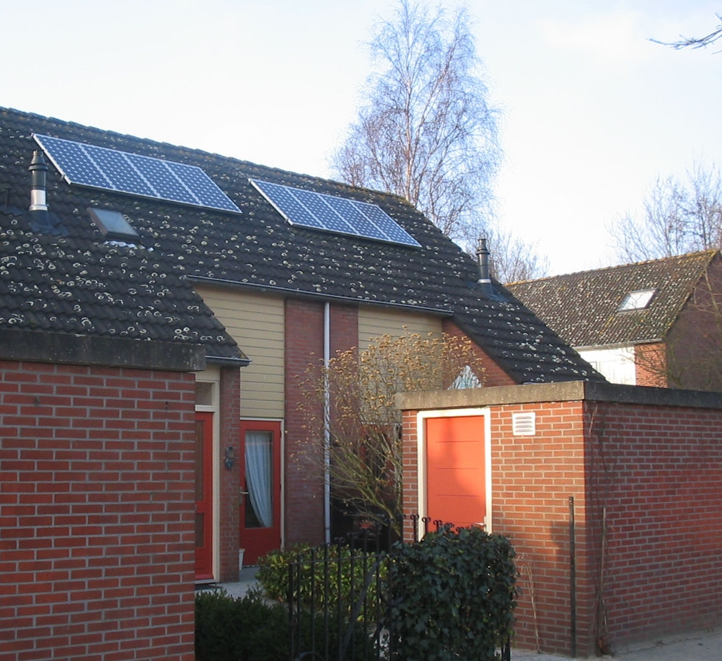 zonnepaneel op dak